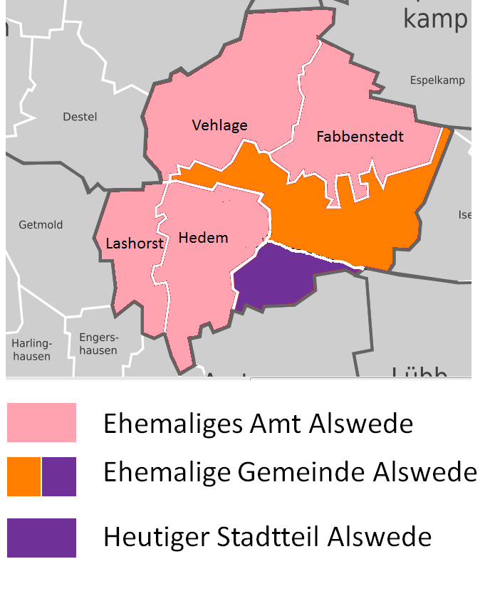 Alswede im Wandel der Zeit - vor und nach der Gebietsreform